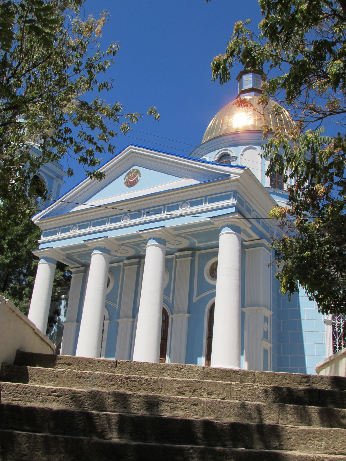 Собор Спасо-Преображенський (Свято-Вознесенський), Білгород-Дністровський, Свердлова вул., 75а